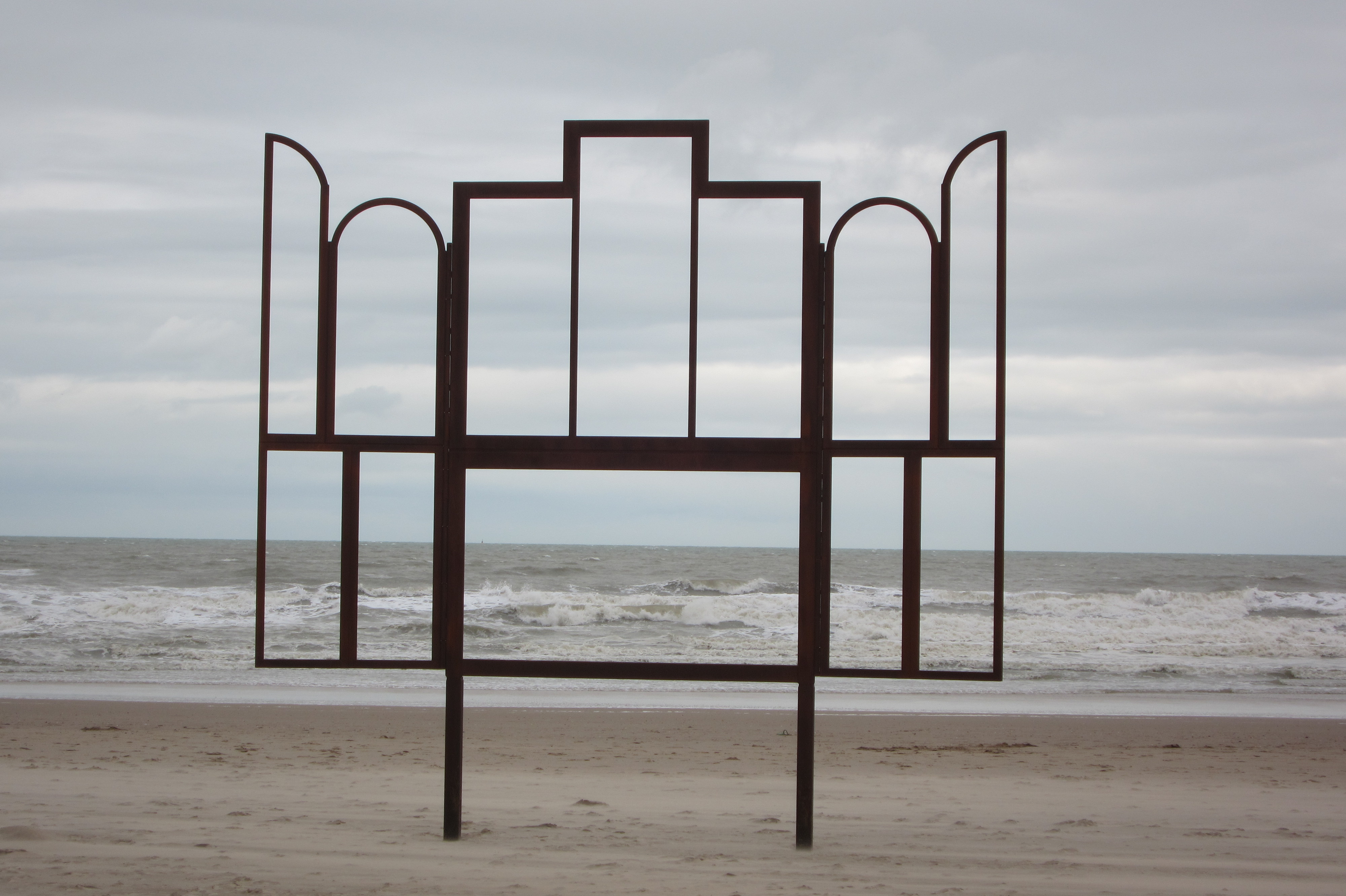 Altar, 2014, Kris Martin